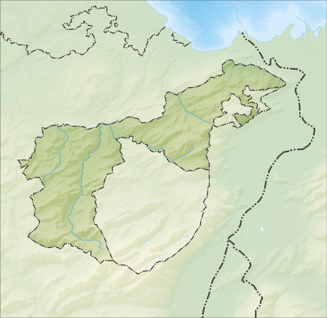 Reliefkarte des Kantons Appenzell Ausserrhoden Topographischer Hintergrund: NASA Shuttle Radar Topography Mission (public domain). SRTM3 v.2.